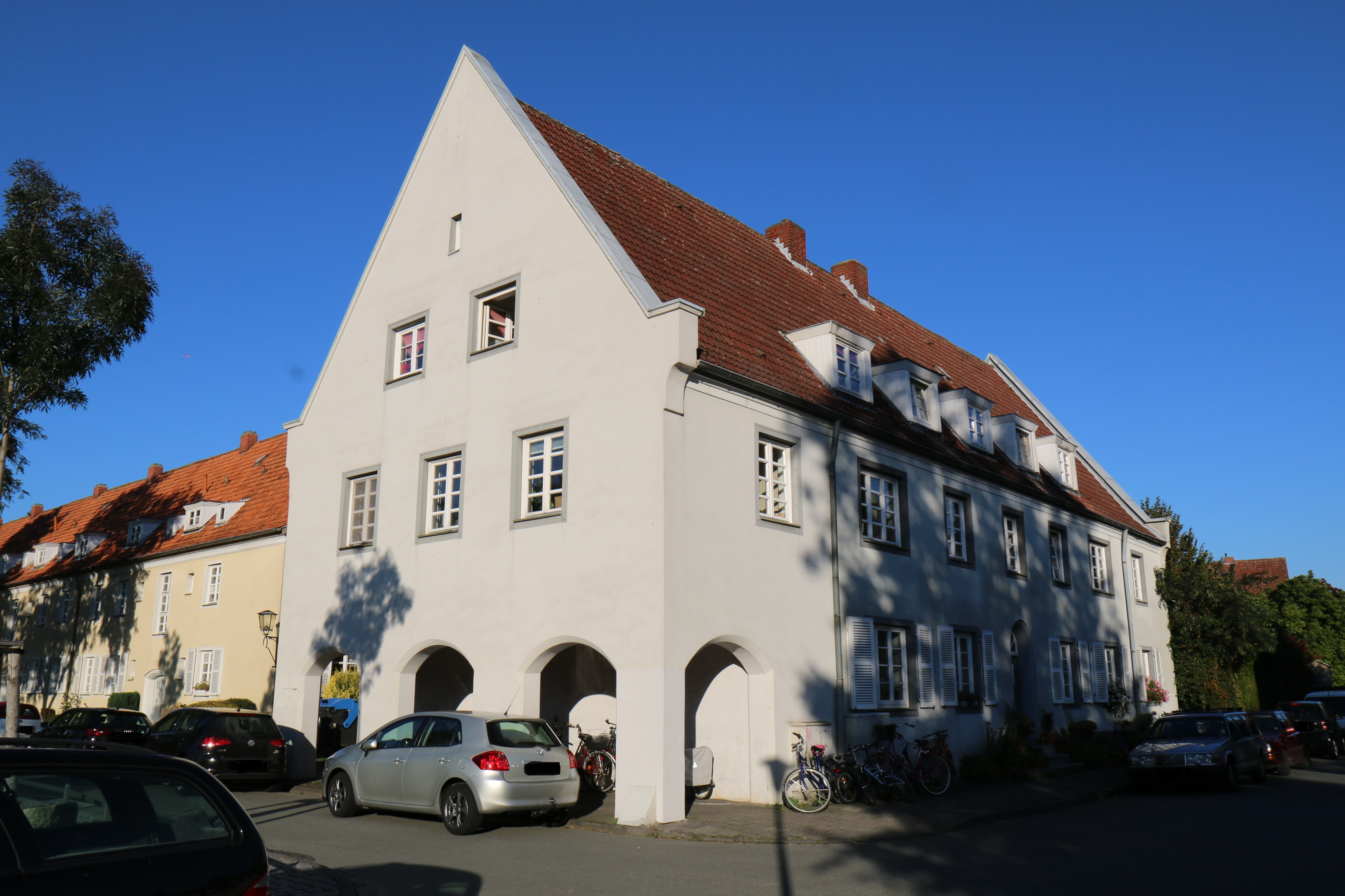 Baudenkmal in Münster (Westf.): Gründer Grund 36